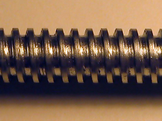 Ira ekstera ŝraŭbeco Mi, aŭtoro de la bildo, permesas al ĉiuj uzi ĝin kun ĉi tiaj kondiĉoj